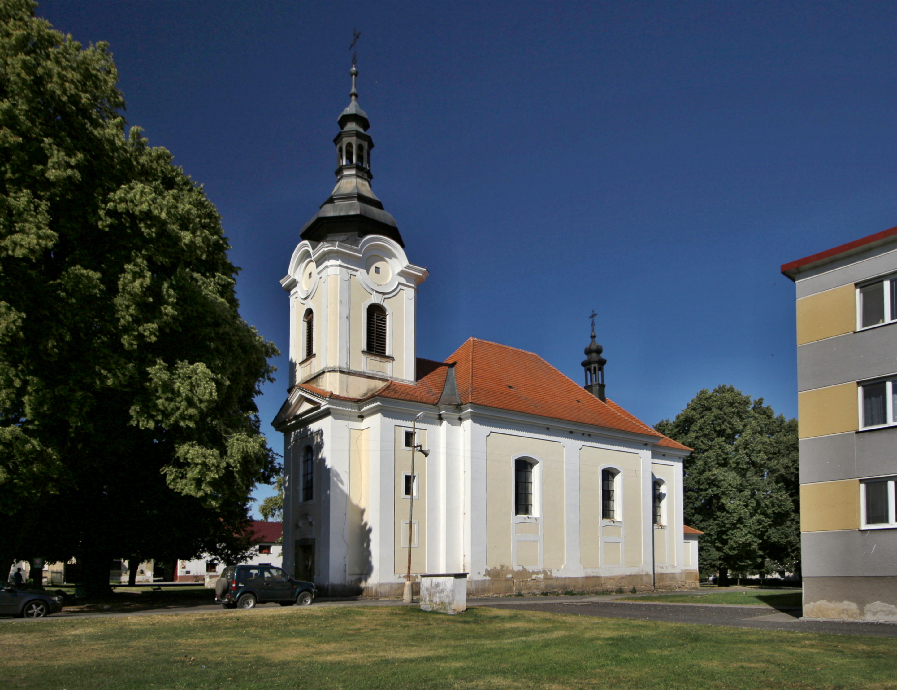 Hředle